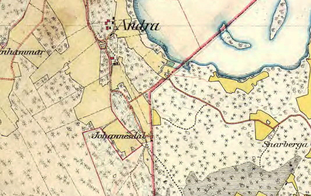 Andra och Johannesdal på Häradsekonomiska kartan